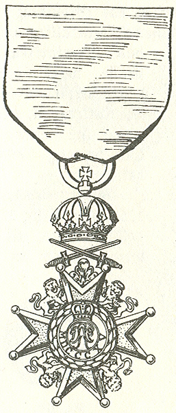 Kruis van de Orde van de Welfen revers